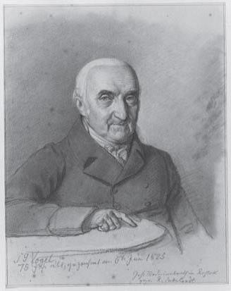 Rudolph Suhrlandt: Samuel Gottlieb Vogel, 1825 Kreide, gewischt, auf braunem Papier, 26 x 20,2 cm Bezeichnet u. Mitte: S. G. Vogel 75 Jahre alt gez. am 6 ten Juni 1825 Geh. Medizinalrath in Rostock. Inv. Nr. NGB/SLZ Nr. 86 Kupferstichkabinett Berlin (Baudis HZ 94)